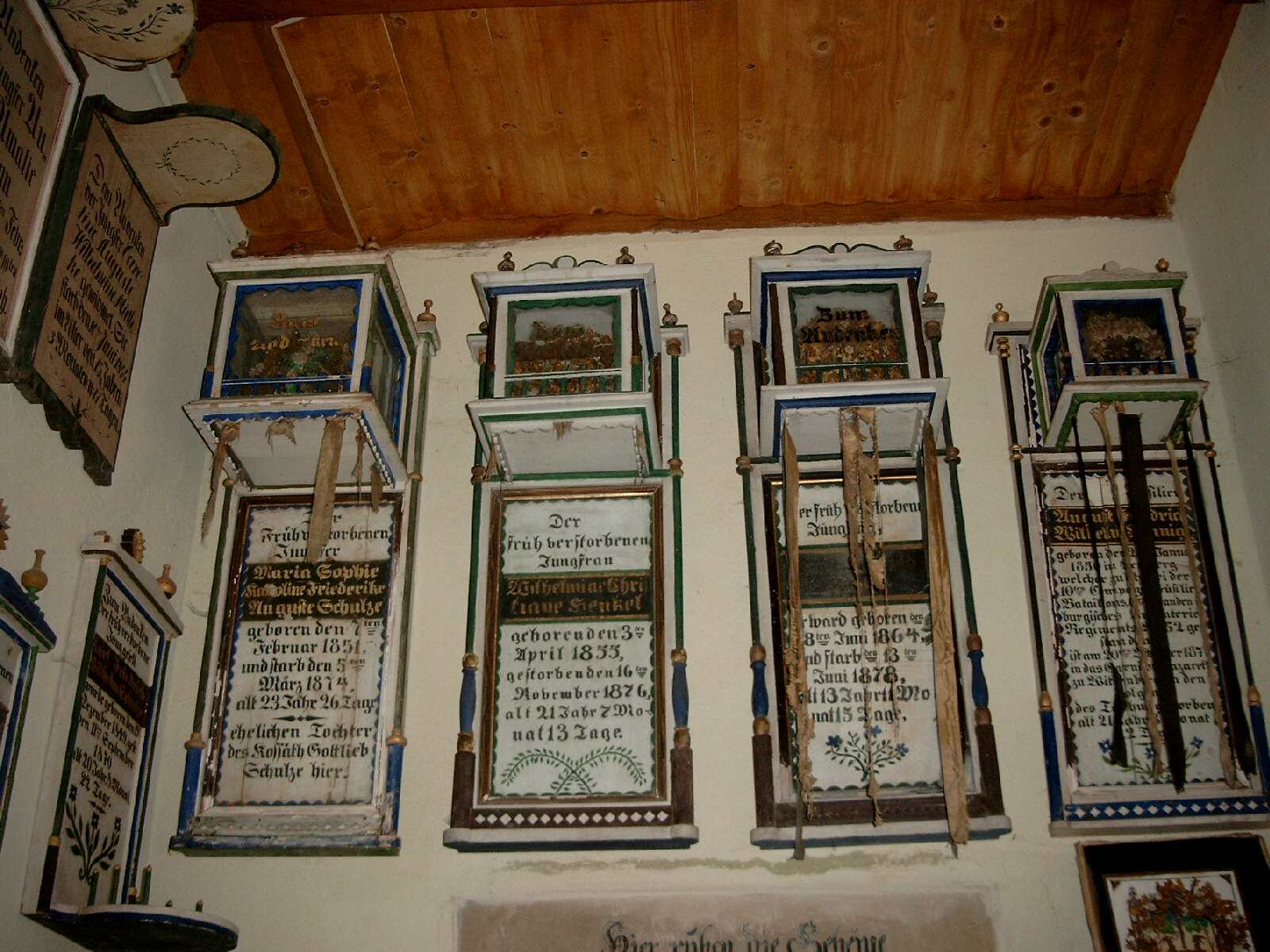 Totenkronen in Dorfkirche Herzberg, Gem. Rietz-Neuendorf, Brandenburg, Deutschland